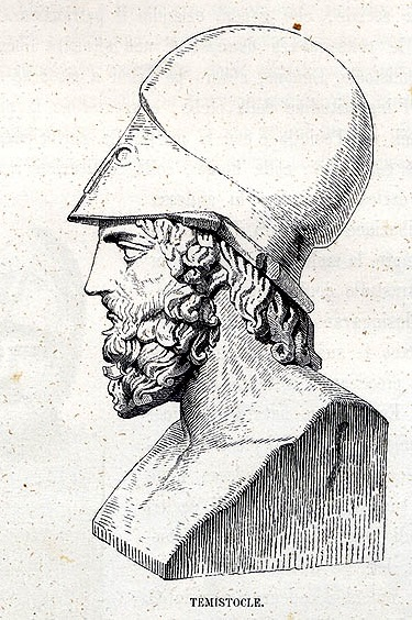 Incisione raffigurante un busto dedicato a Temistocle